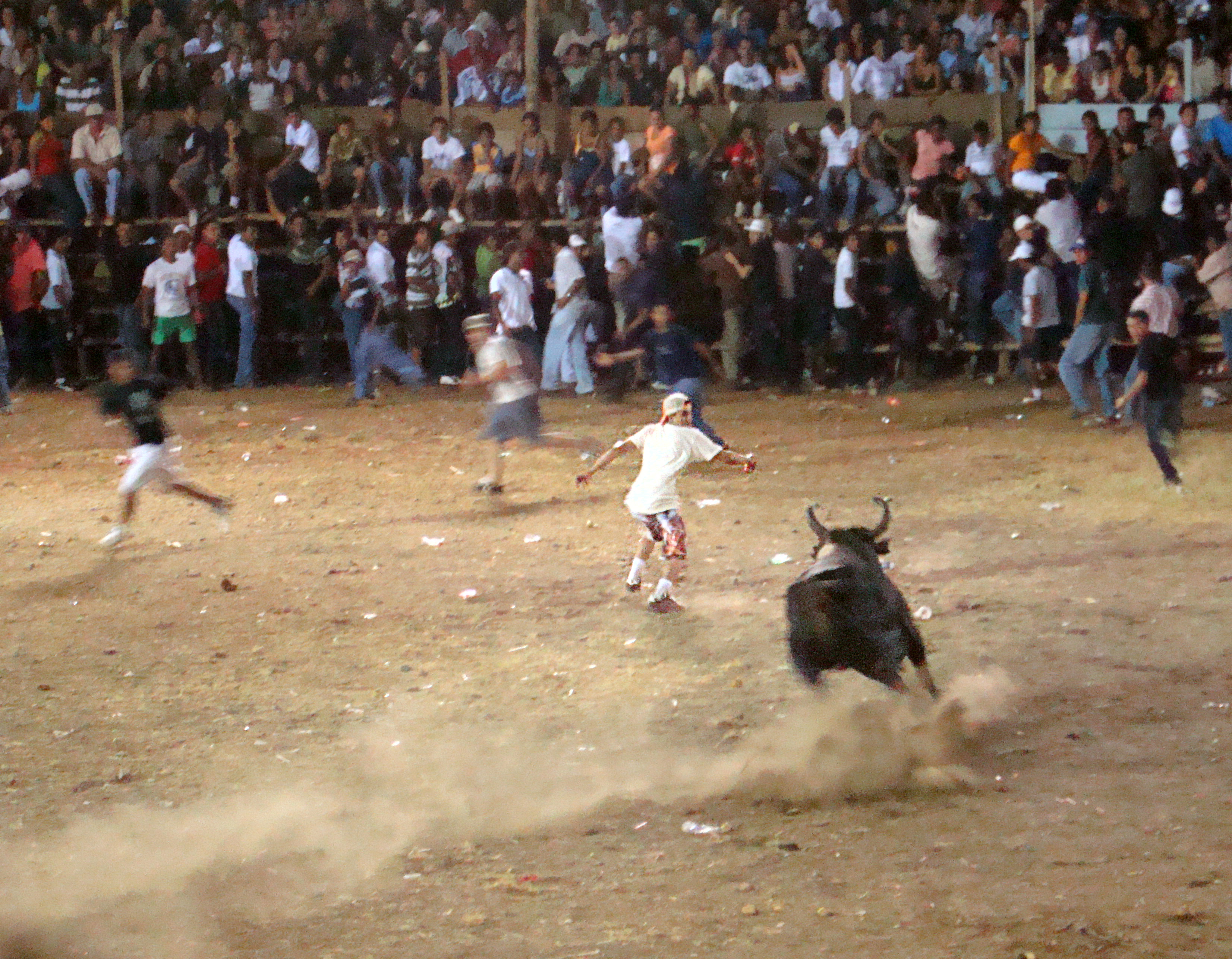 Corrida de toros a la tica en Santa Cruz de Guanacaste, Costa Rica.